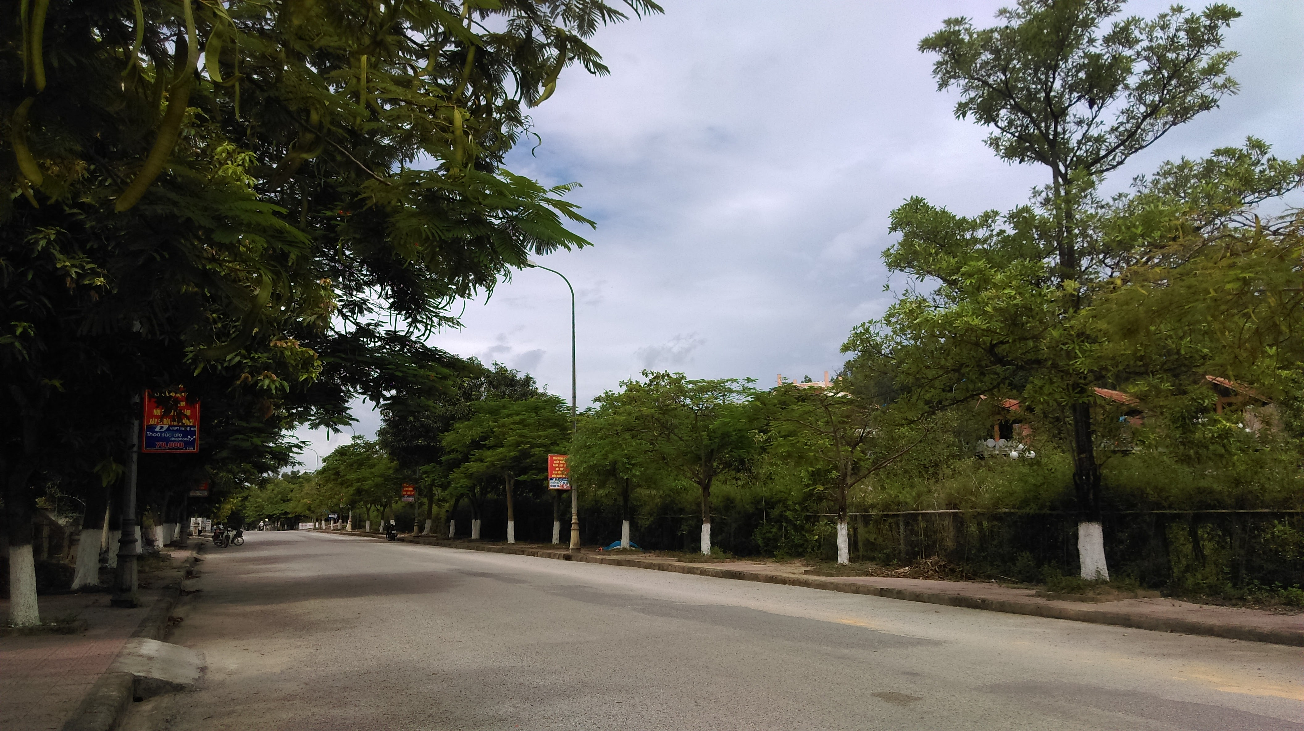 Khu mộ bà Hoàng Thị Loan